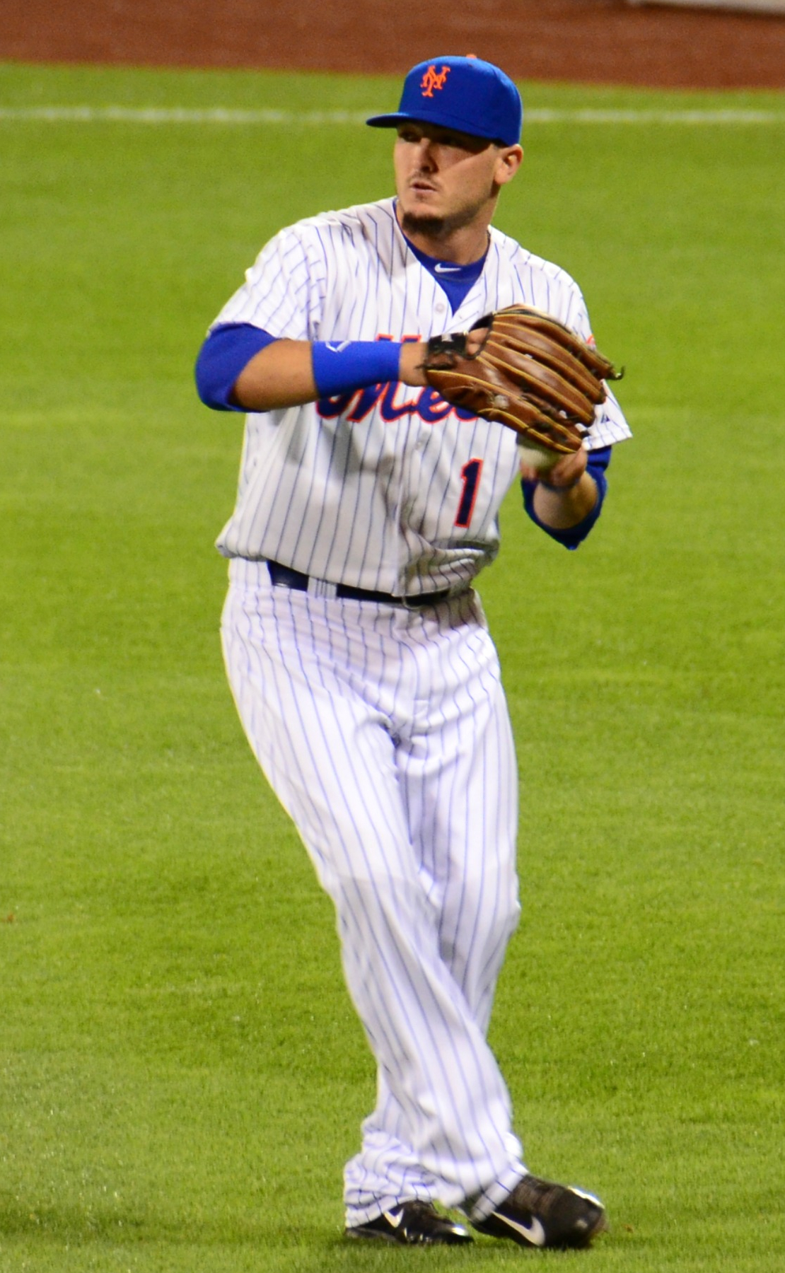 Darrell Ceciliani